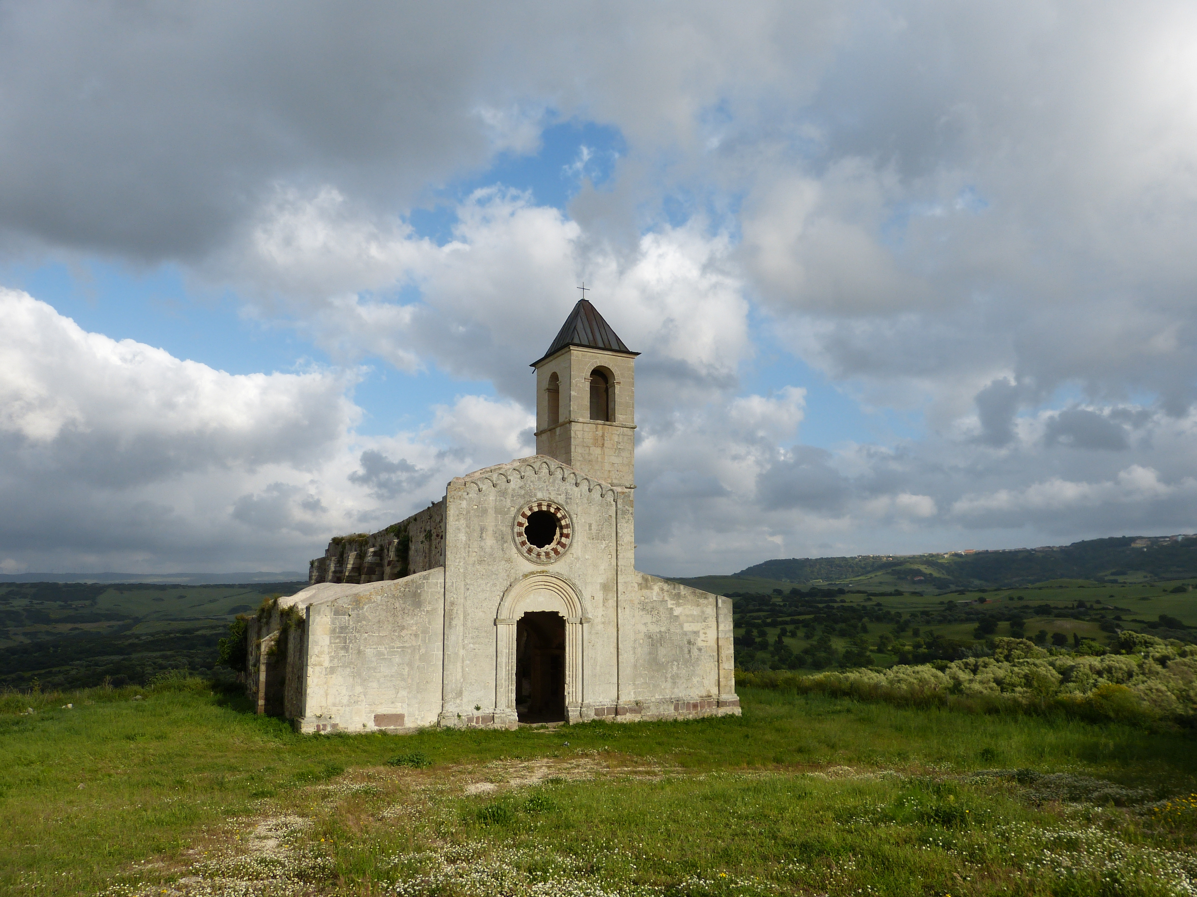 Chiesa di San Pantaleo, in der Gemeinde Martis, Sardinien